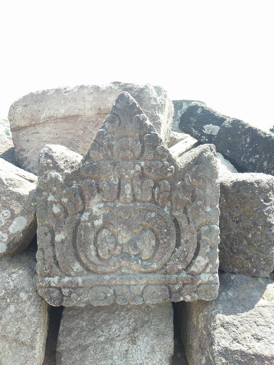 Candi Plaosan Lor